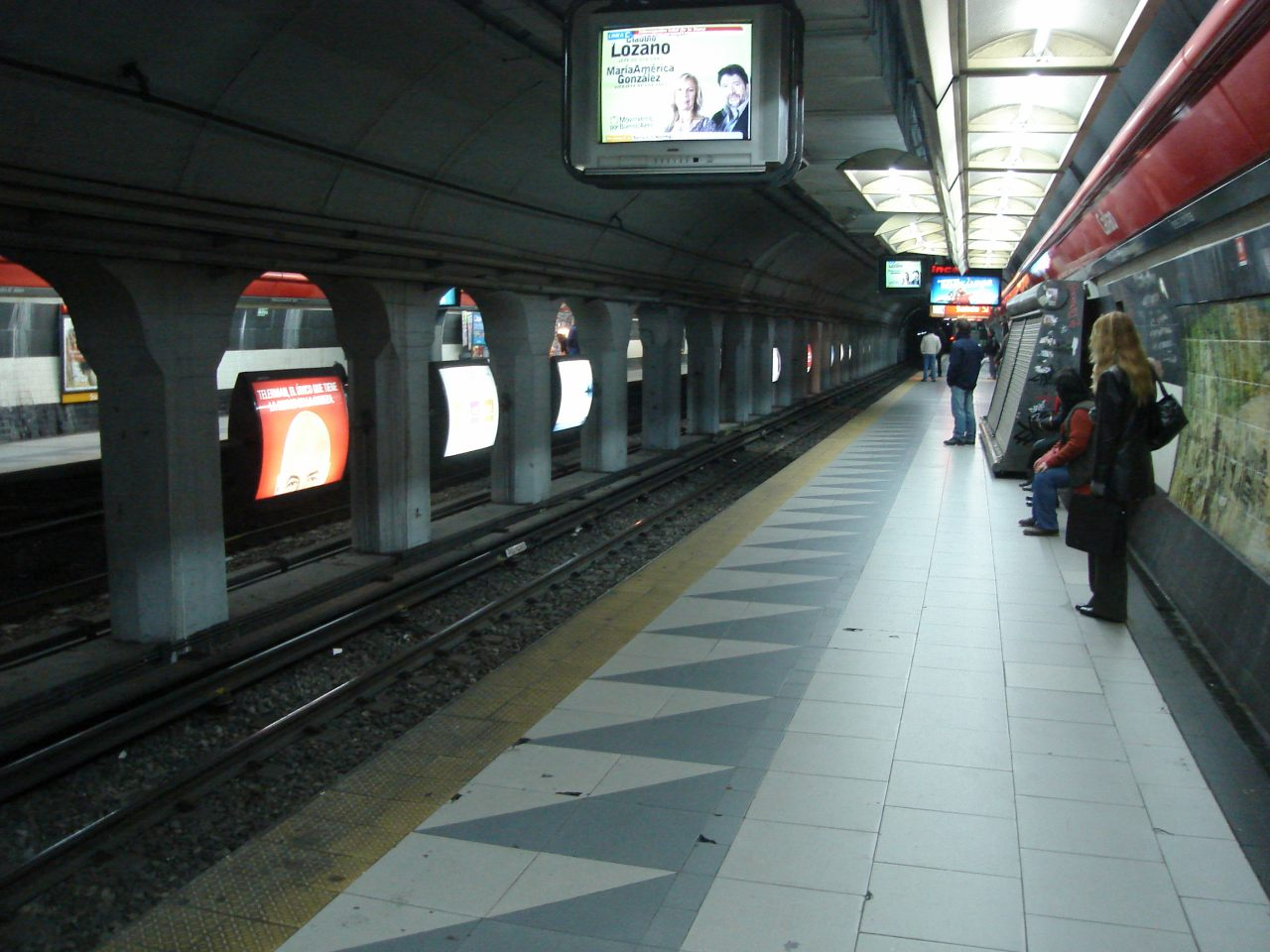 Vista del andén a Los Incas de la estación Callao de la línea B de subterráneos porteña, sector boleterías.